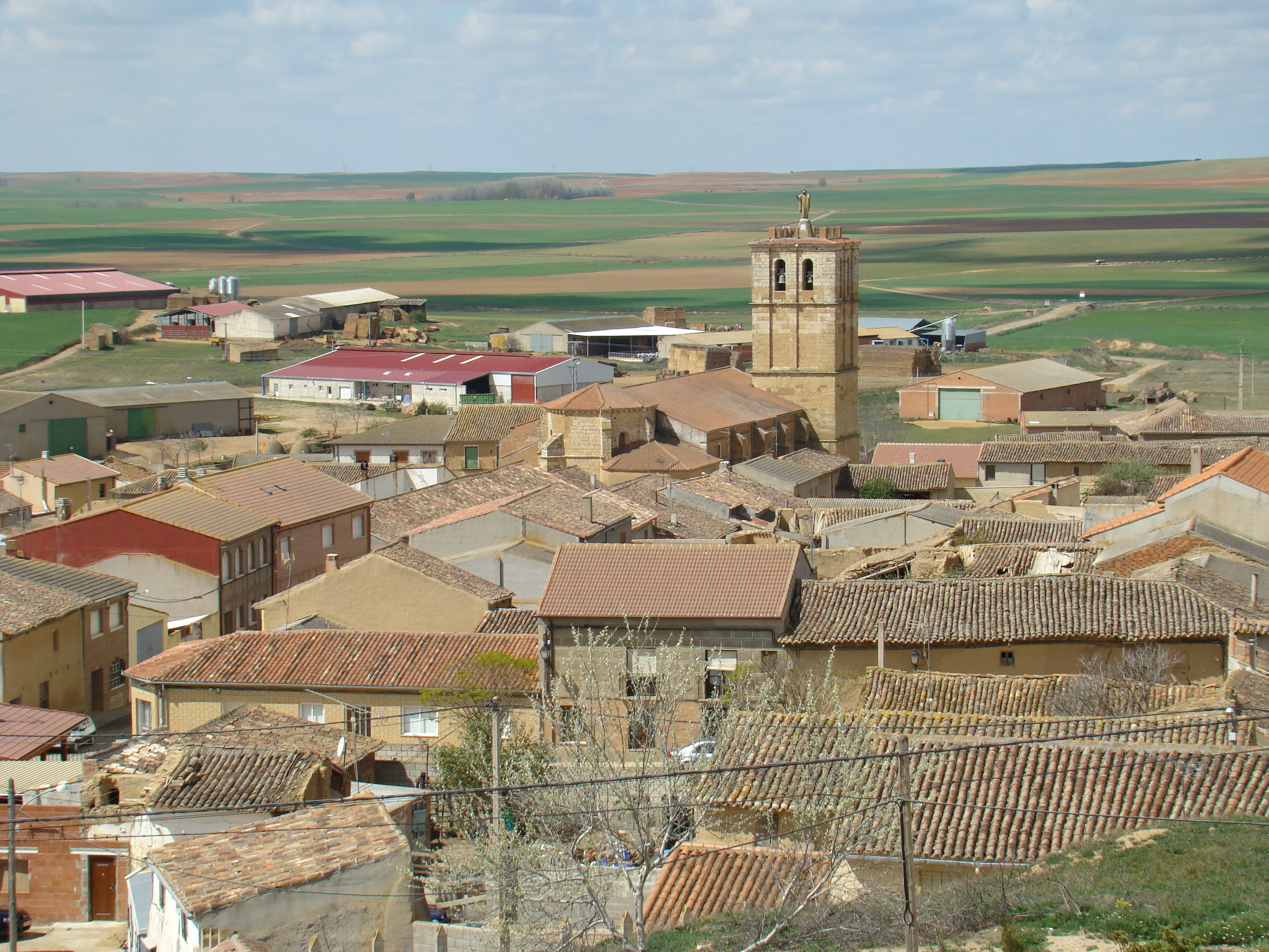 Aguilar de Campos, población española de la provincia de Valladolid. El caserío visto desde lo alto.